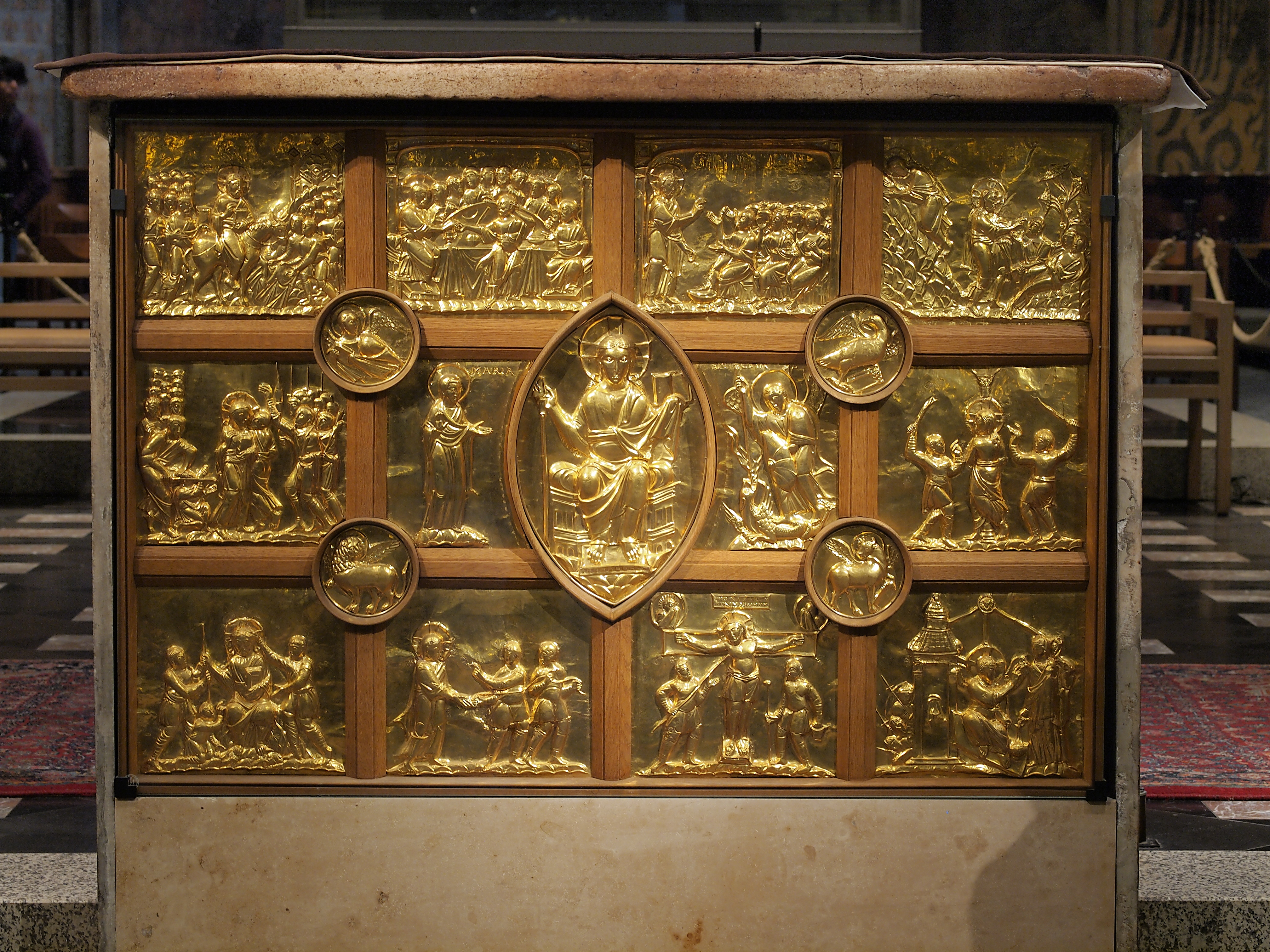 Westseite des Altarstisches im Dom in Aachen, Denkmal